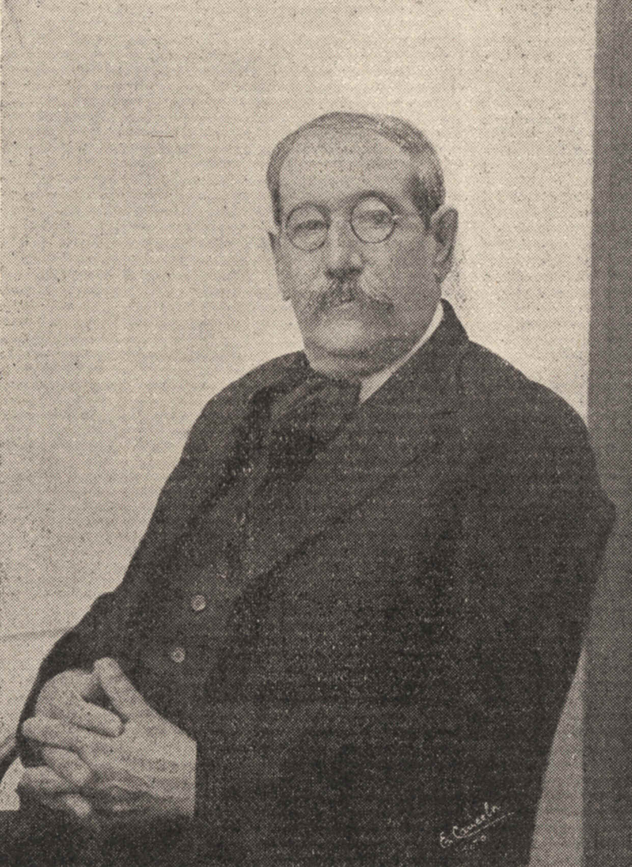 Fotografía de José Alonso y Trelles (1857 - 1924), escritor y poeta gauchesco uruguayo de origen gallego.